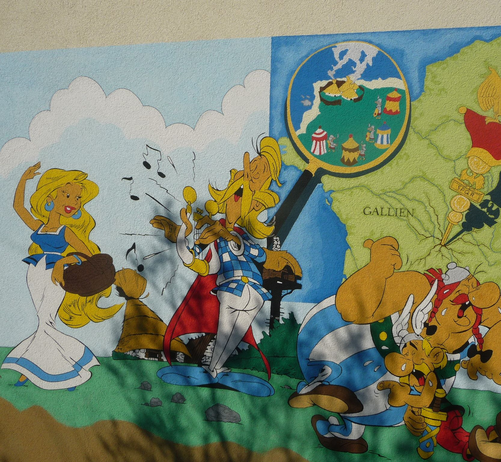 Eine so schöne Asterix-Wand hätte ich auch gerne. Ludwigshafen, Germany.